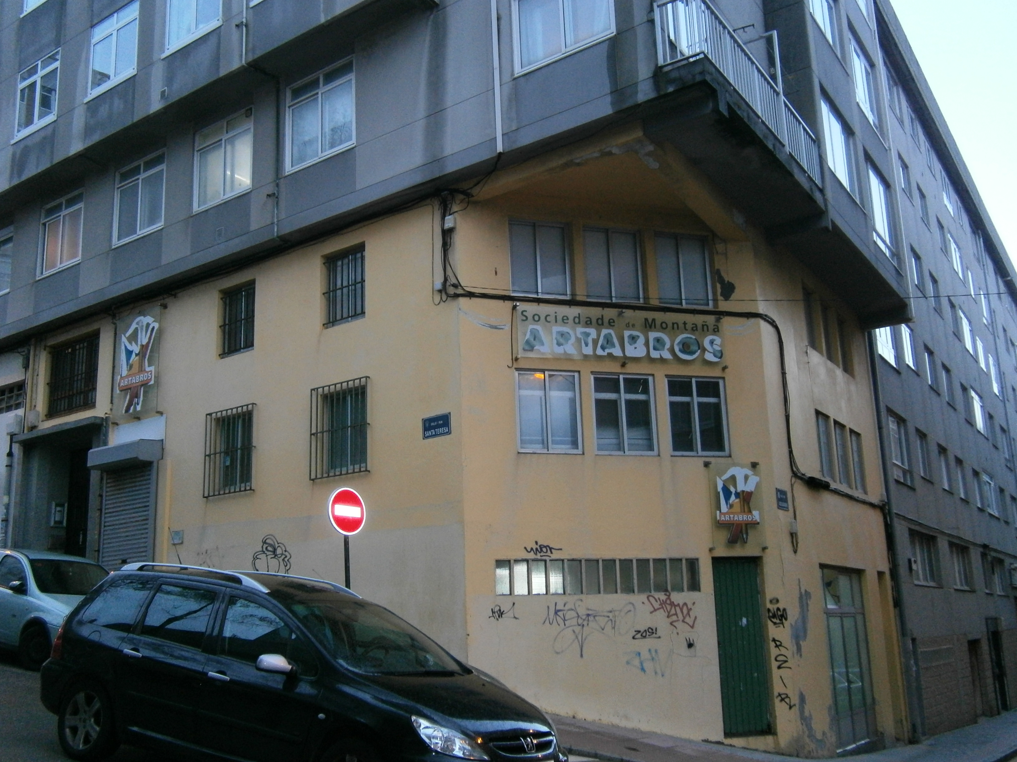 Sede da Sociedade de Montaña Ártabros